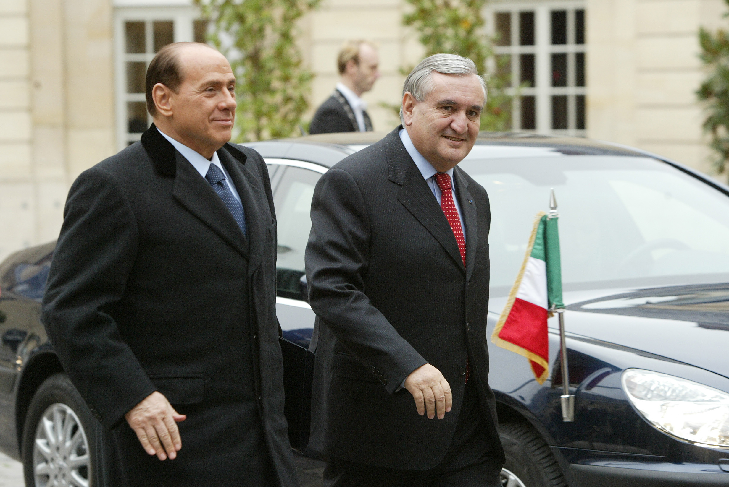 EPP Summit 4 December 2003 Paris